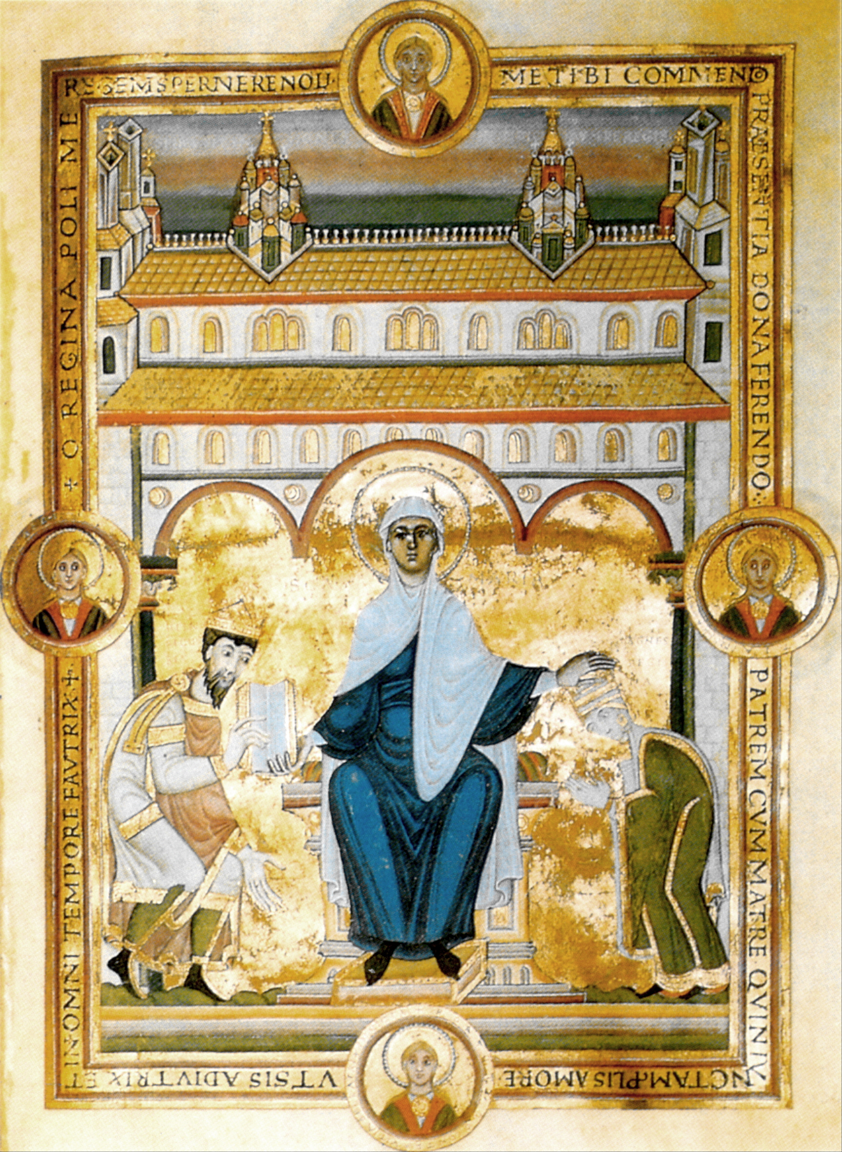 La miniatura representa a Enrique III el Negro (1017-1056), emperador del Sacro Imperio Romano Germánico, y a su esposa Inés de Poitou.